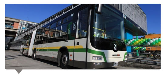 Bi articulados de la empresa metro en la ciudad de medellín, saliendo de la estación Hospital